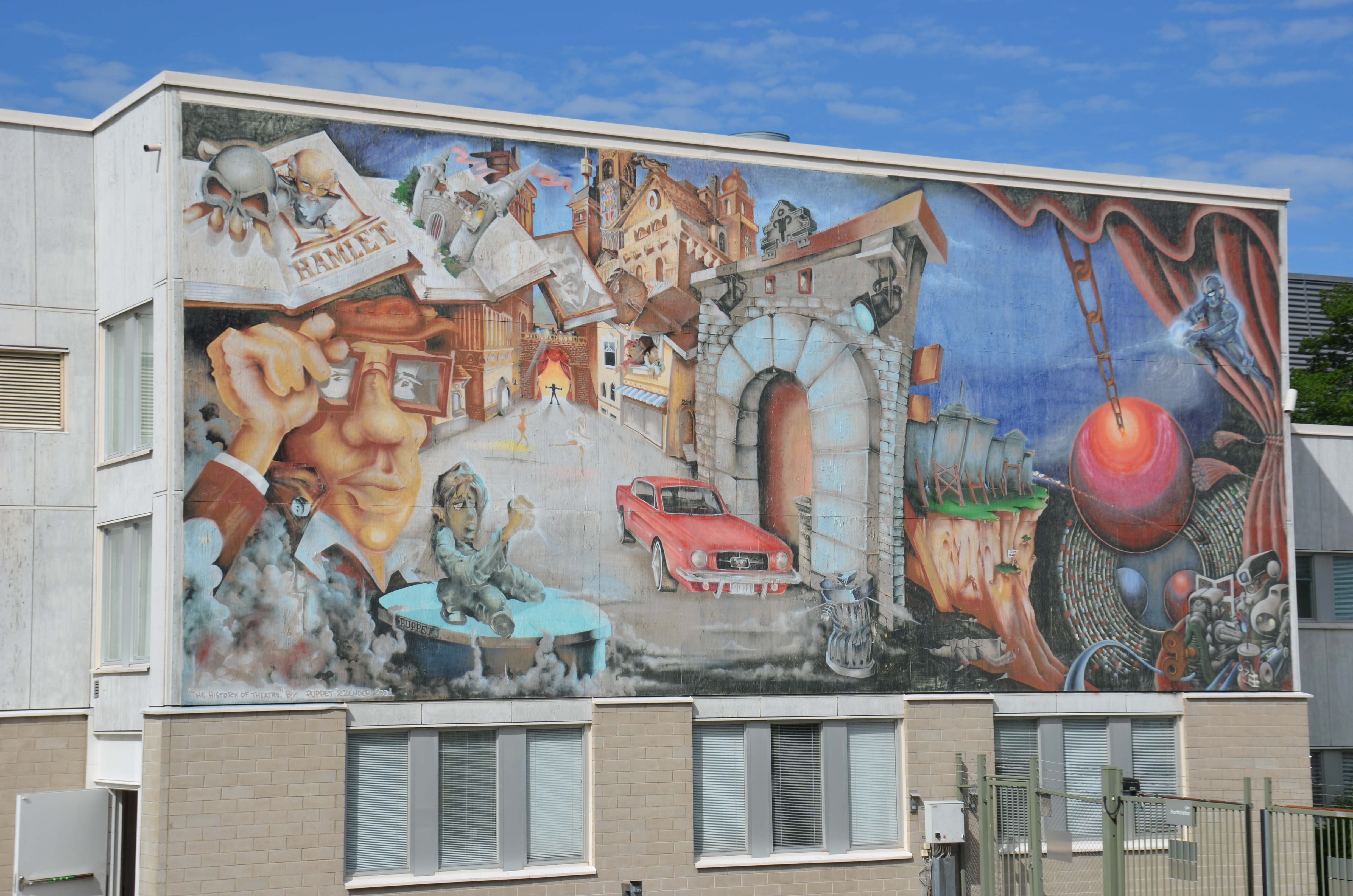 Lennart Mörks östra målning på¨fasaden till Riksteatern, Hallunda, Botkyrka